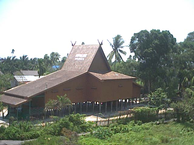 Koleksi pribadi, hasil pemotretan kamera digital, Lokasi di Kampung Kenanga Ulu, Kelurahan Sungai Jingah, Kota Banjarmasin, merupakan bangunan Rumah Banjar Bubungan Tinggi yang masih asli kemudian dijadikan museum perjuangan rakyat Kal-Sel "Waja Sampai Kaputing" (Museum Wasaka)